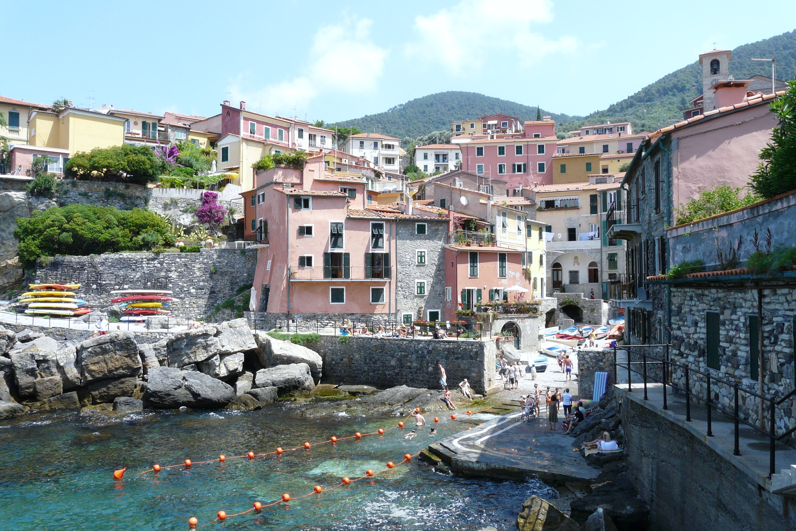 Foto varie di Tellaro, Lerici, Liguria, Italia.